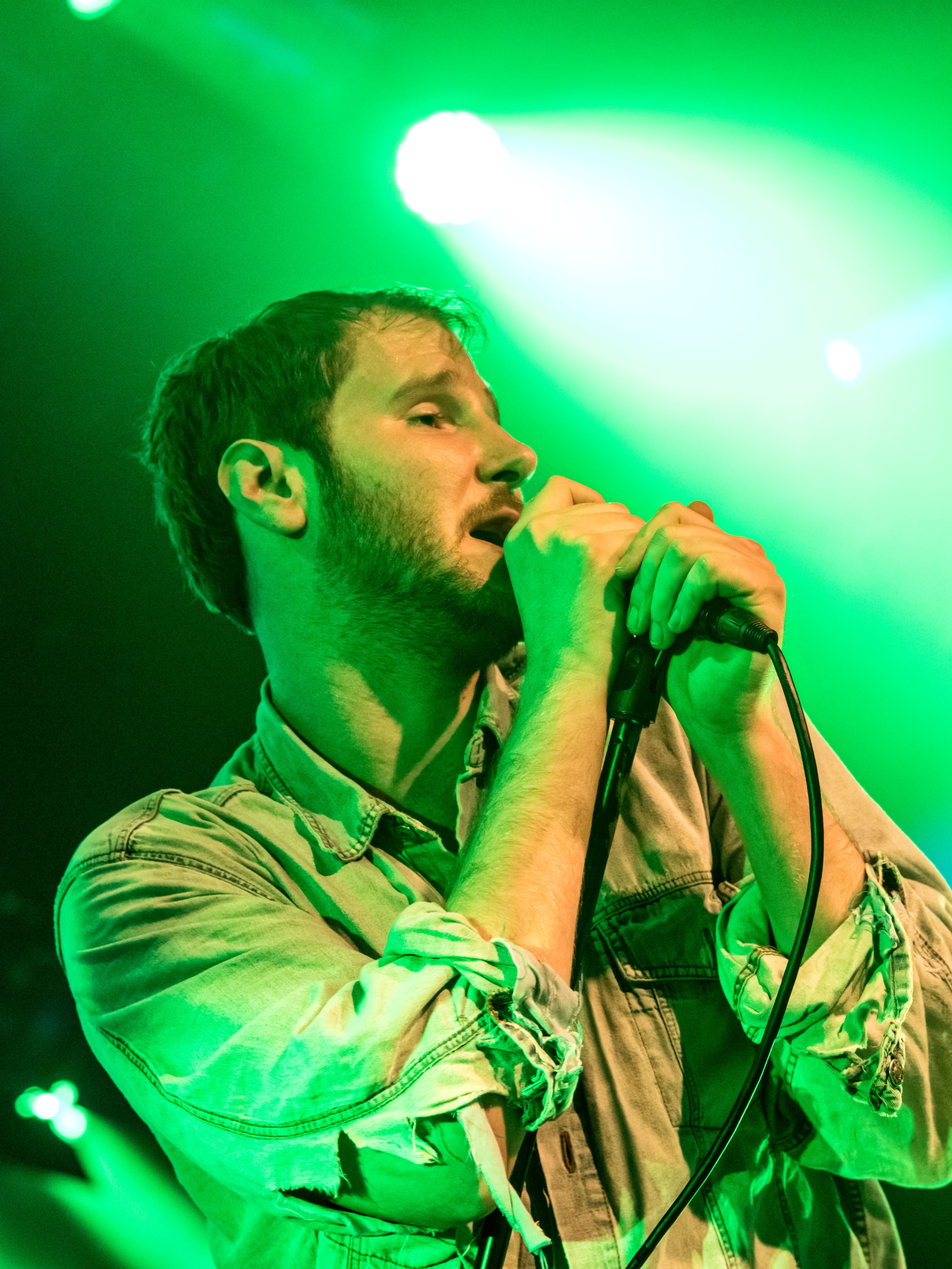 Bilder vom Zelt Musik Festival 2016 in Freiburg im Breisgau Wanda mt Ansa